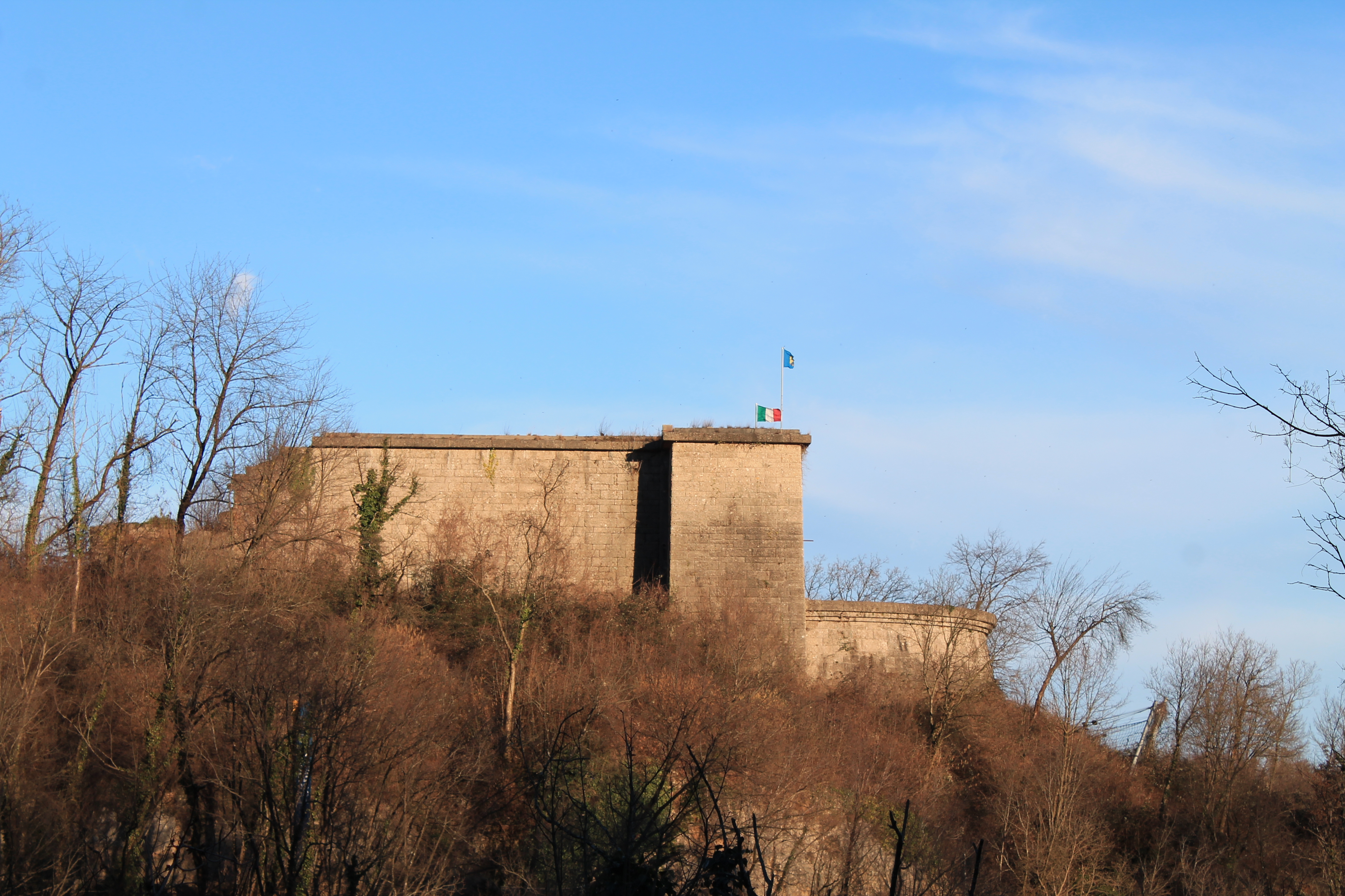 Ossario di Pinzano ripreso da Ovest